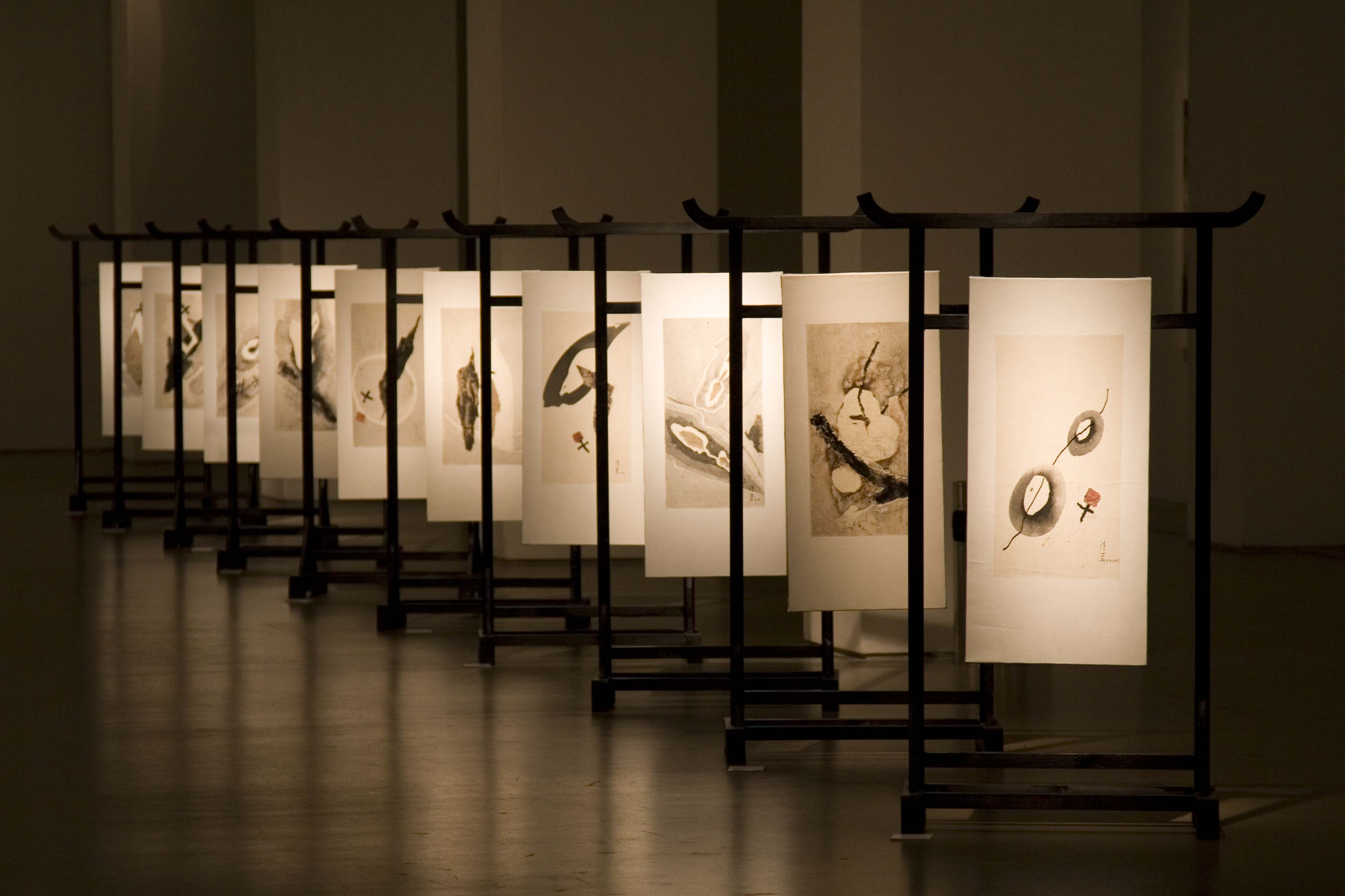 Exposition Li Chevalier, Today Art Museum, Pékin